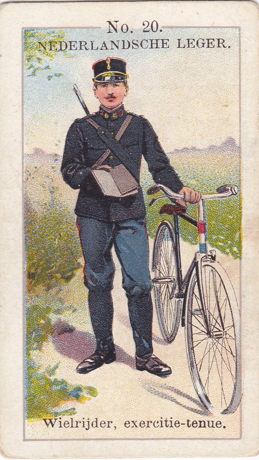 Uniform van het Nederlandsche leger rond 1900